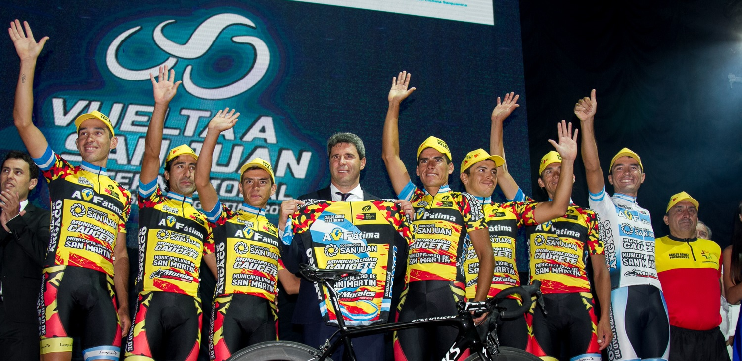 Vuelta a San Juan 2017 - Equipo Asociación Civil Agrupación Virgen de Fátima (Argentina) Depicted team: Asociación Civil Agrupación Virgen de Fátima